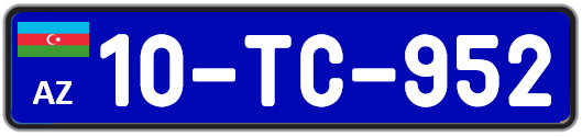 Azərbaycan Respublikası avtomobil dövlət qeydiyyat nişanı - Sərnişin Daşıma